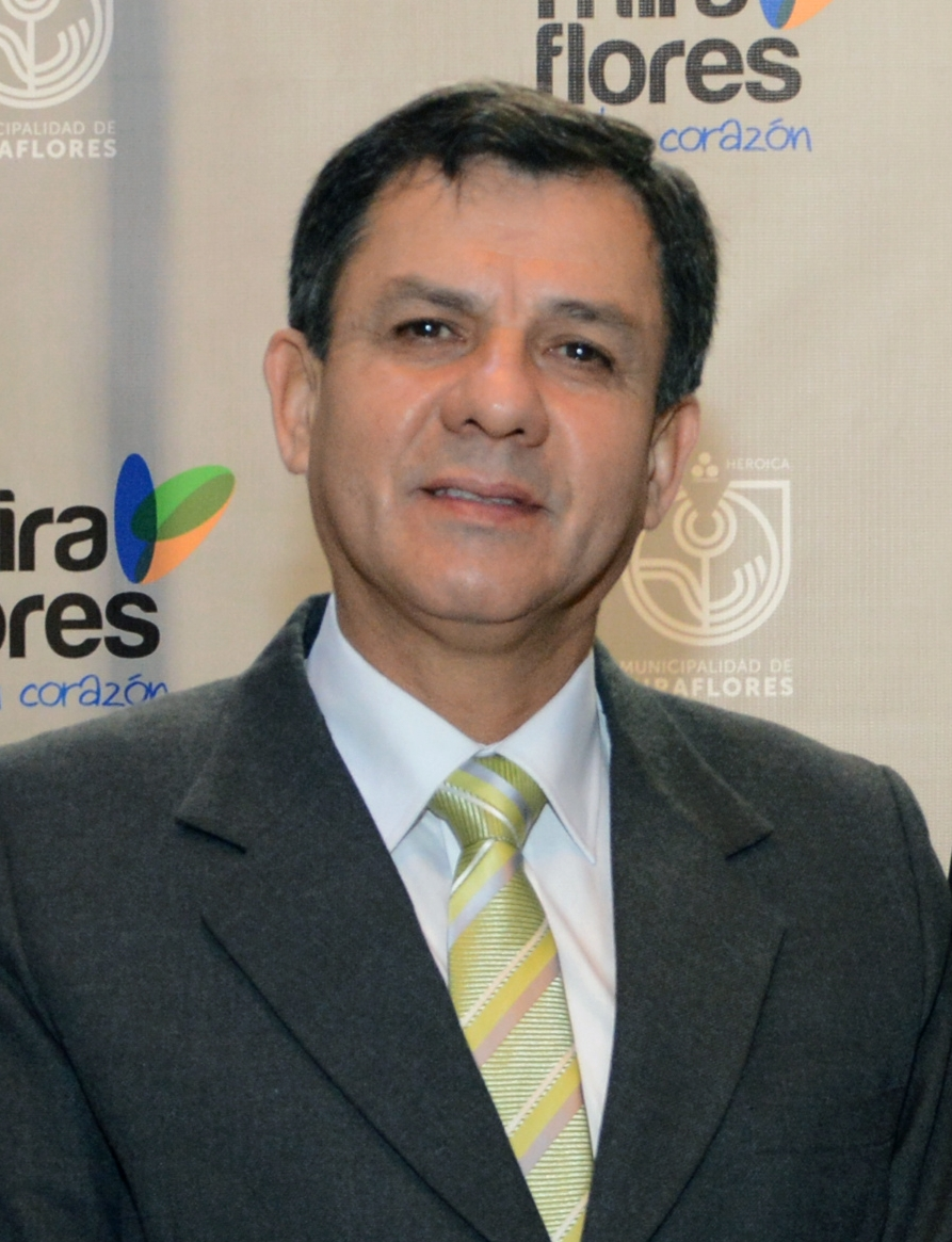 Mauro Arturo Medina Guimaraes (n. 1956) general retirado de la Policía Nacional del Perú (PNP). Actualmente es Ministro del Interior del Perú, desde el 2 de abril de 2018.